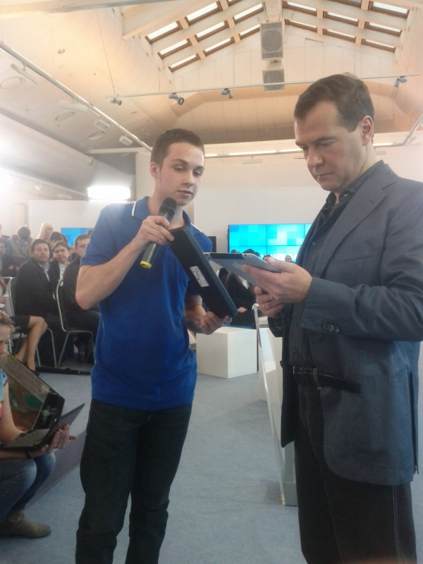 Михаил Самарский и Дмитрий Анатольевич Медведев во время встречи с российскими блогерами.